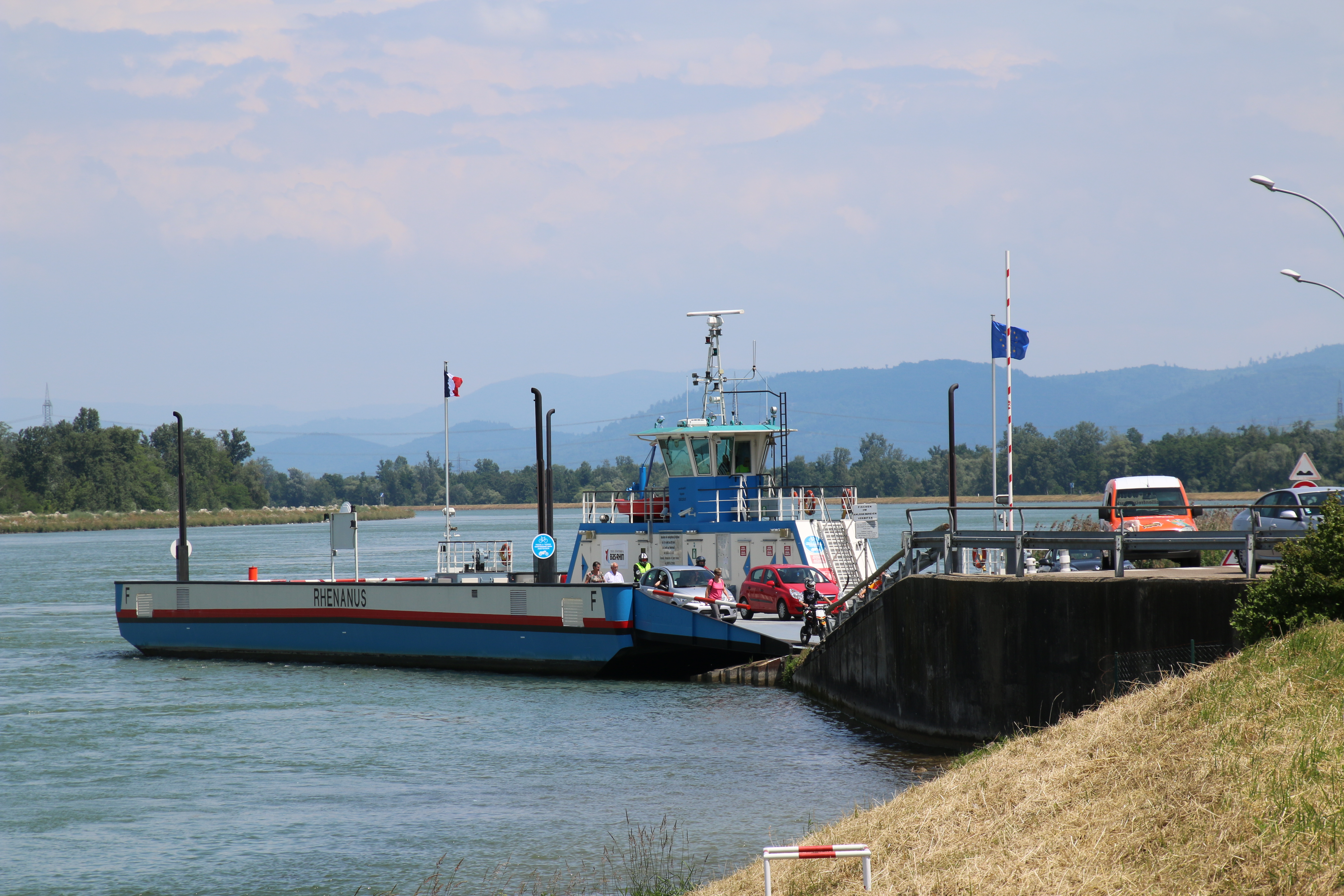 Rheinfähre "Rhenanus" Kappel/Rhinau